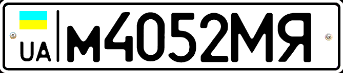 Автомобильный номер физических лиц Украины, стандарт 1993 года